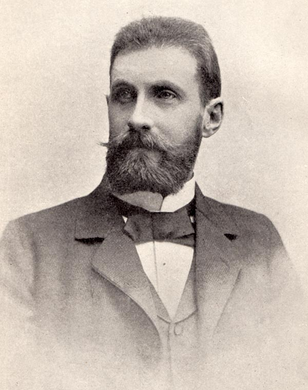 Georg Nordensvan